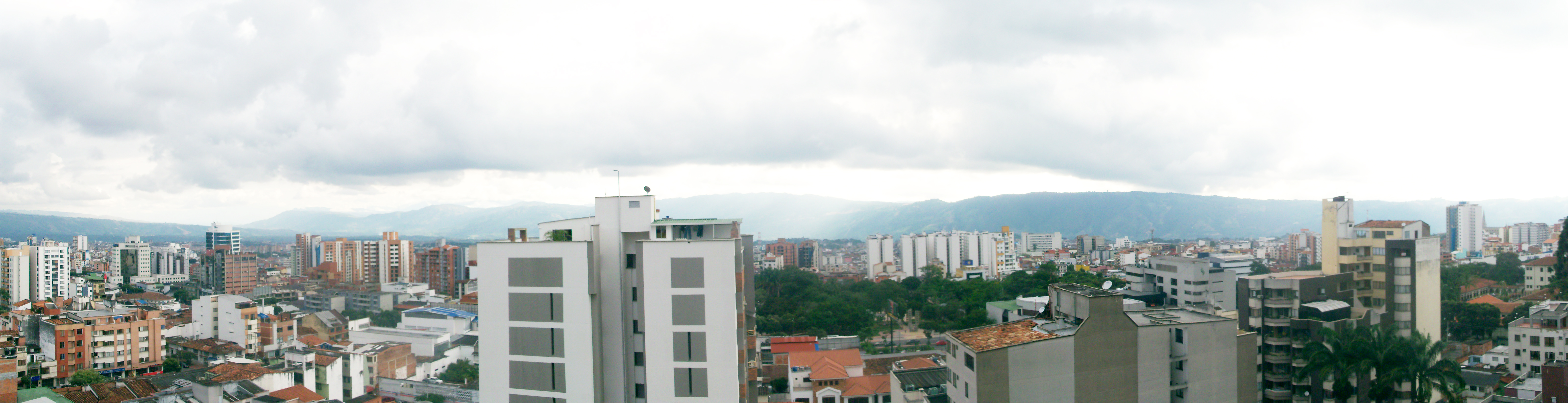 Panoramica de la ciudad de Bucaramanga desde un edificio en el barrio La Aurora